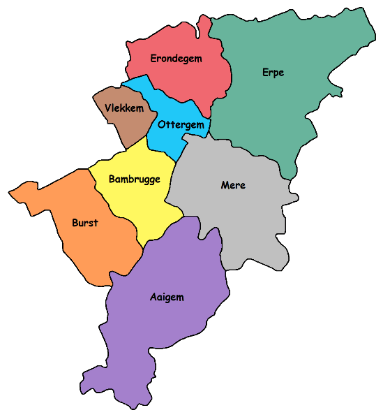 Kaart van Aaigem, Bambrugge, Burst, Erondegem, Erpe, Mere, Ottergem en Vlekkem.